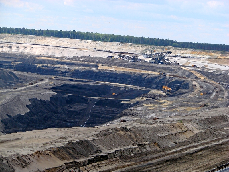 Blick zum Tagebau Welzow-Süd unmittelbar am Rand des Gutes Geisendorf.